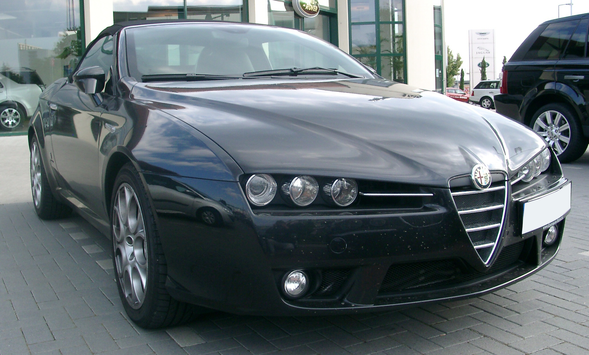 Alfa Romeo Spider 939 (6. Generation)